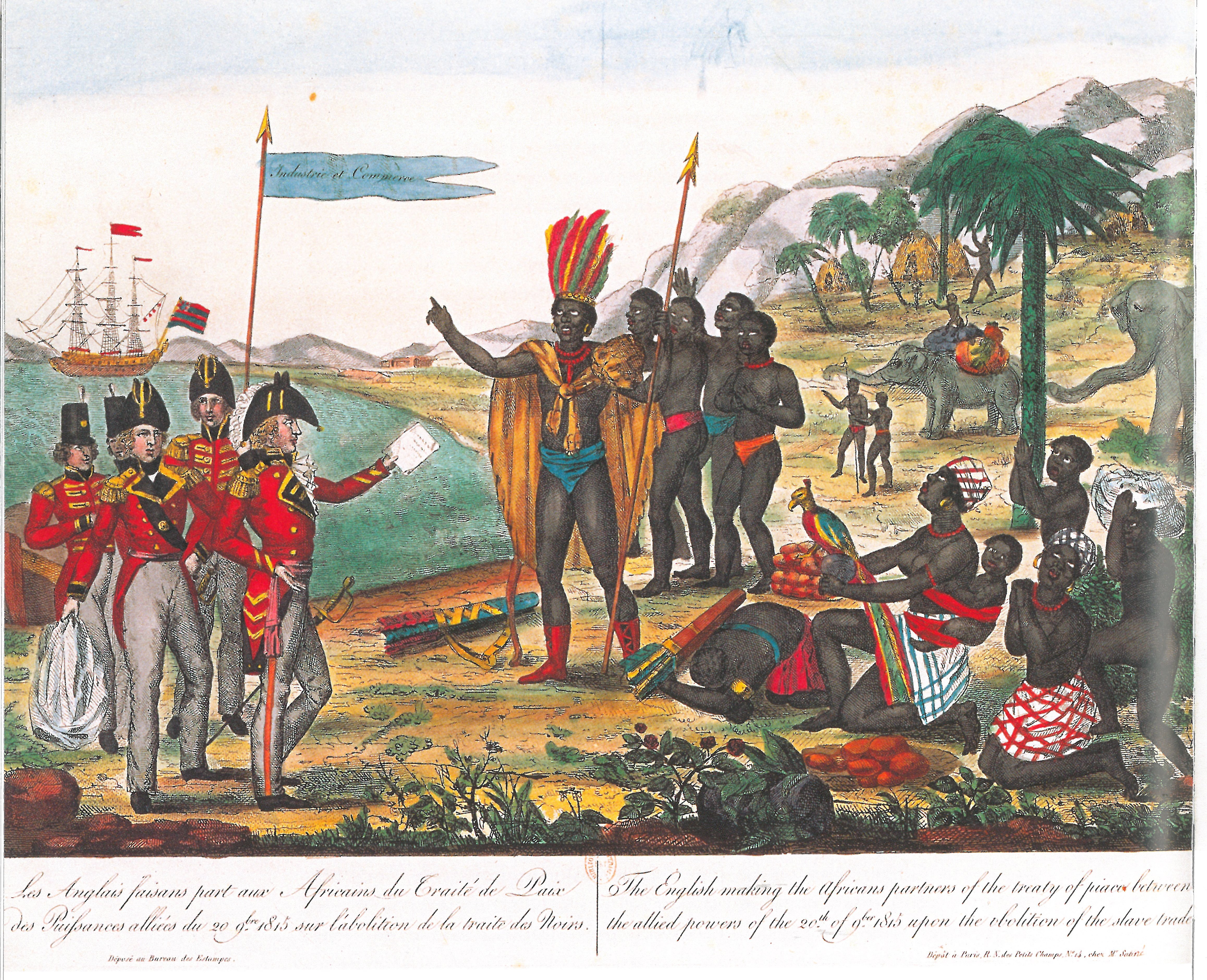 Lithographie conservée à la Bibliothèqe nationale de France, imprimée à Paris et légendée en français et en anglais à l'occasion du congrès de Vienne. On peut lire, en français : "Les Anglais faisans part aux Africains du Traité de paix des puissances alliées du 20 octobre 1815 sur l'abolition de la traite des noirs"